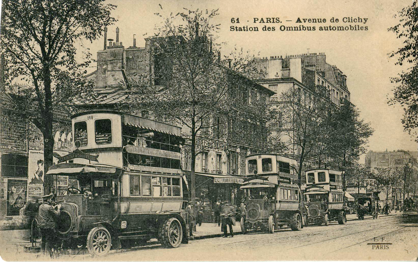 Carte postale ancienne éditée par FF à Paris, n°61 :Paris - Avenue de Clichy - Station des omnibus automobiles.